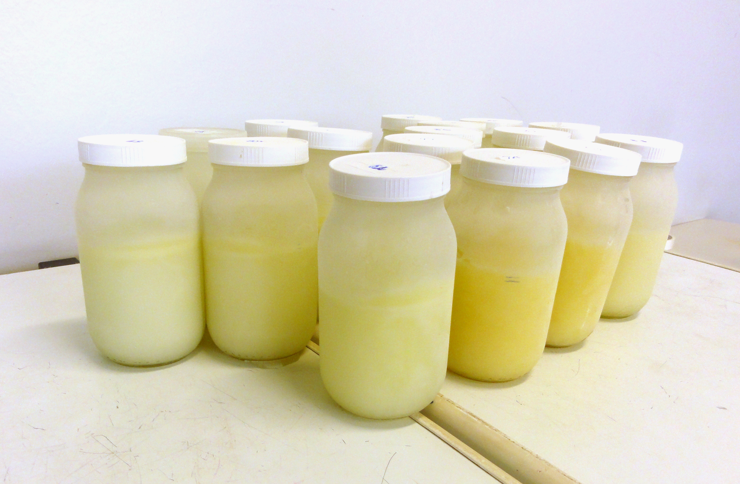 Foto: Paula Araújo